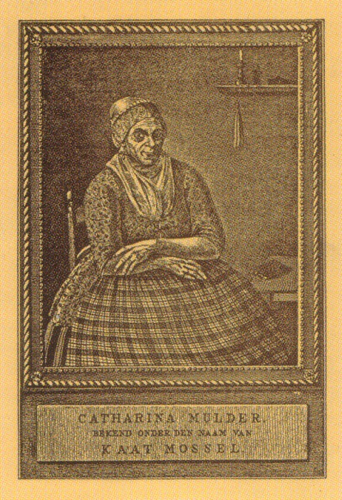 portrait of Kaat Mossel (1723-1798)